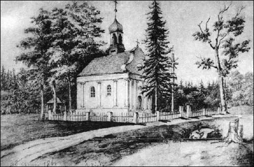 Свята-Духаўскі касцёл у Язвінах на мал. Напалеона Орды